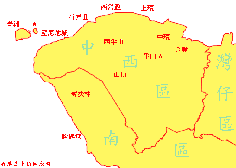 User:Iflwlou漢化